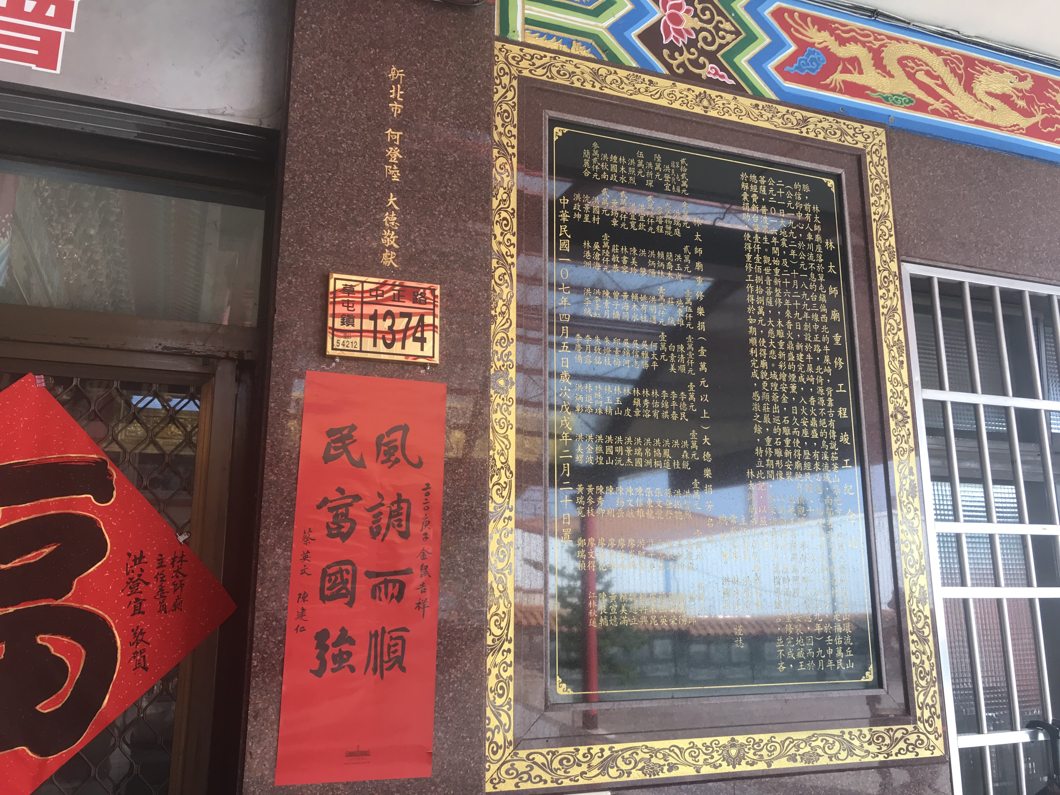 草屯林太師廟門牌與重修紀念誌